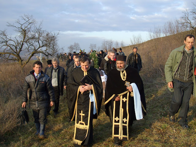 Aruncuta - semne si semnale a imbatrinirii populatiei de la sate